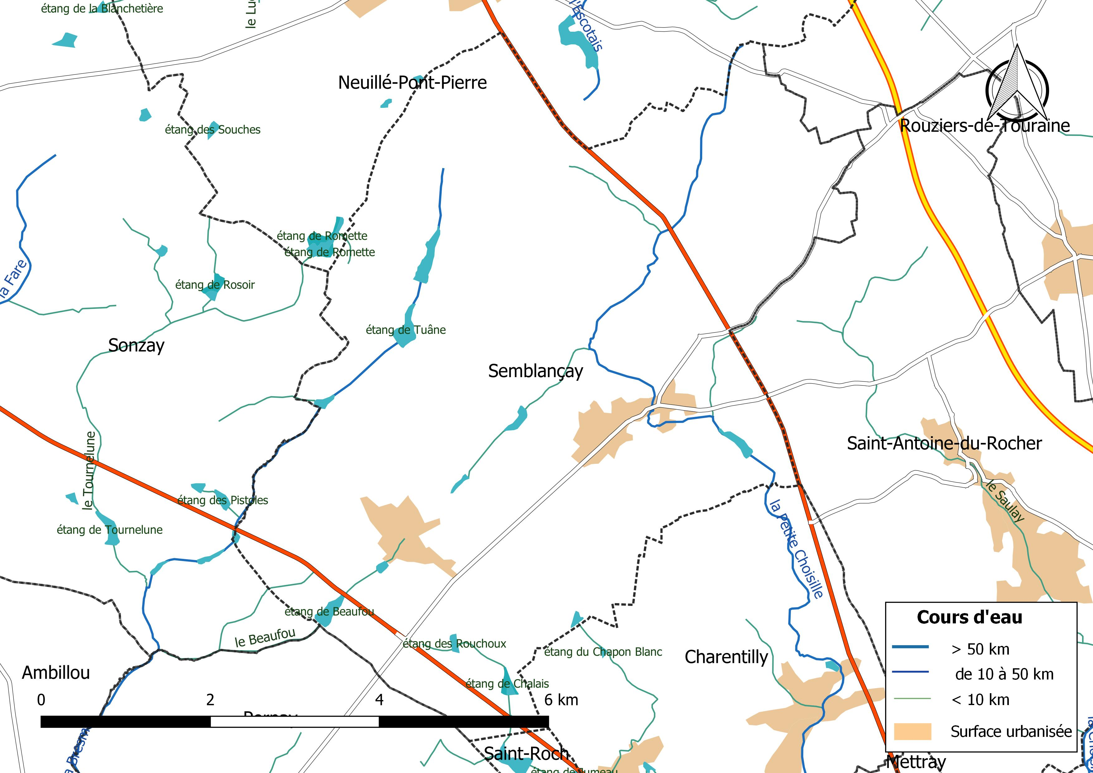 Carte du réseau hydrographique de la commune de Semblançay (France).